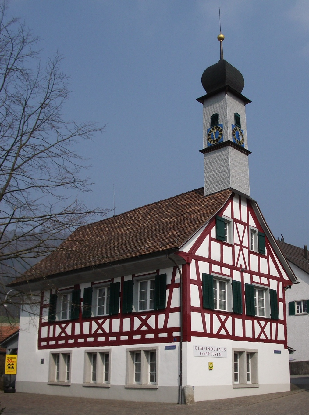 Boppelsen ZH, Switzerland self-made, March 2007